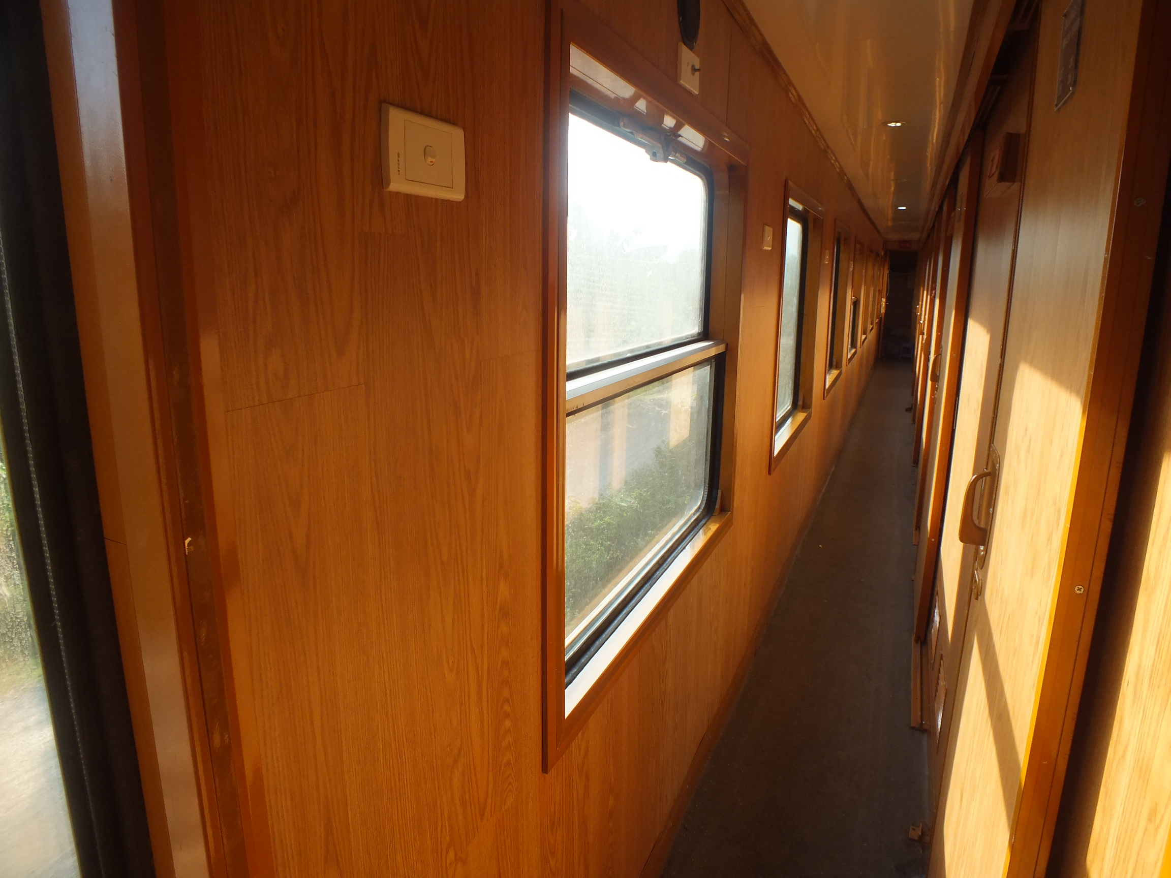 2013-07-16 North–South Railway (Vietnam)SE20